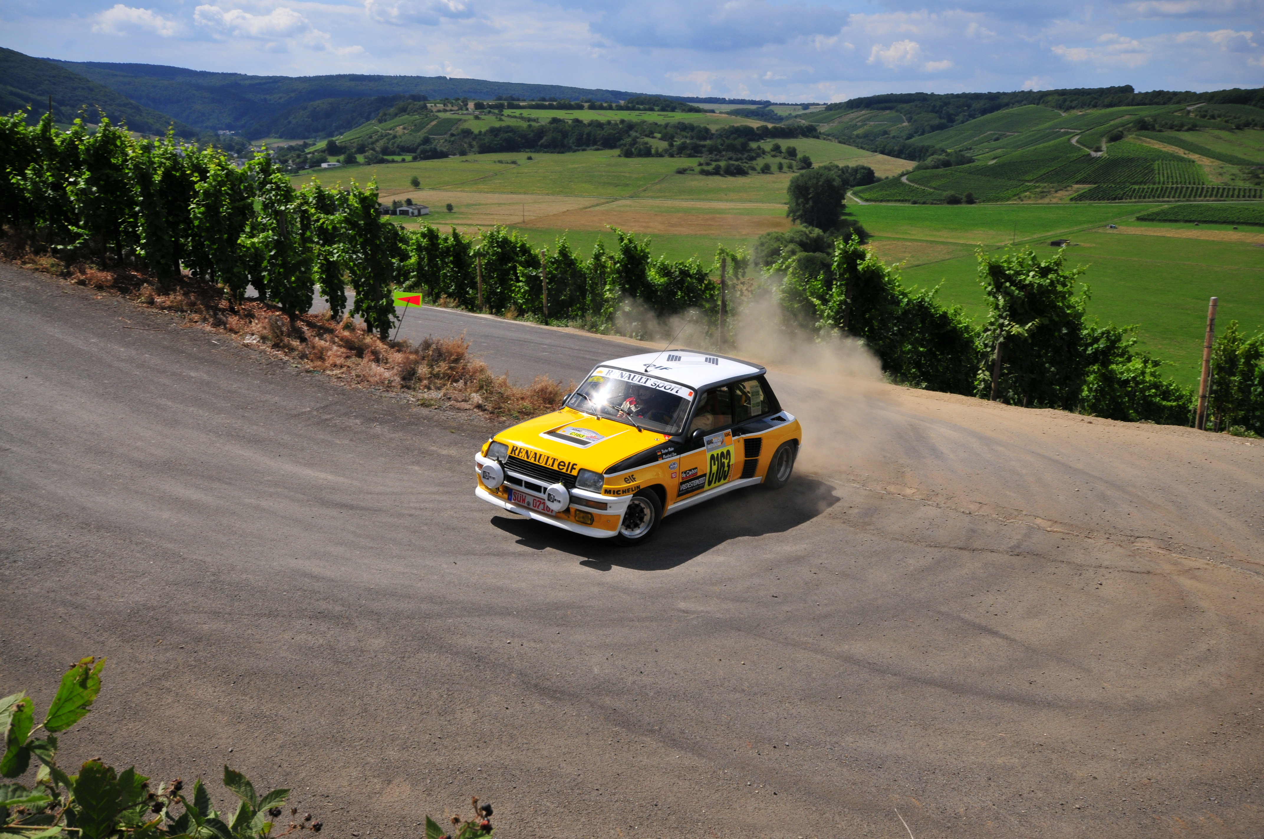 Renault 5 Turbo driven during the 2008 Rallye Deutschland.